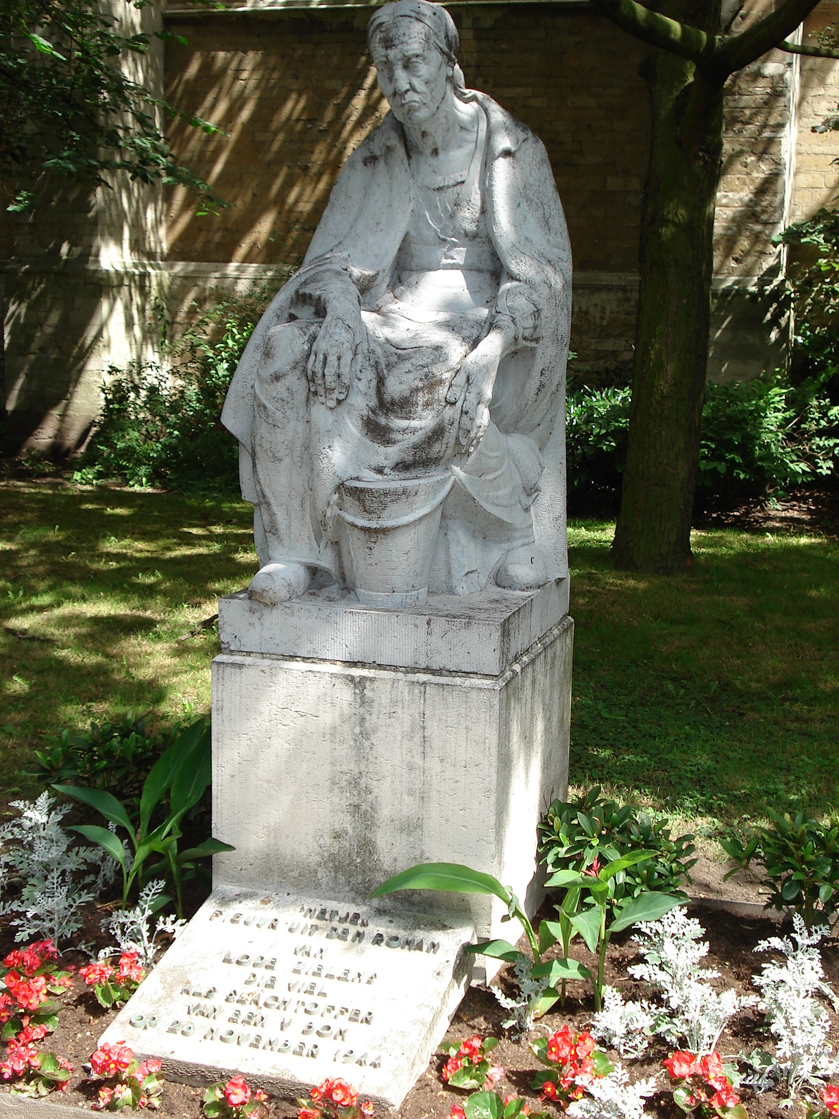 Standbeeld Netje Statue de Netje Sint-Andrieskwartier Antwerpen Anvers